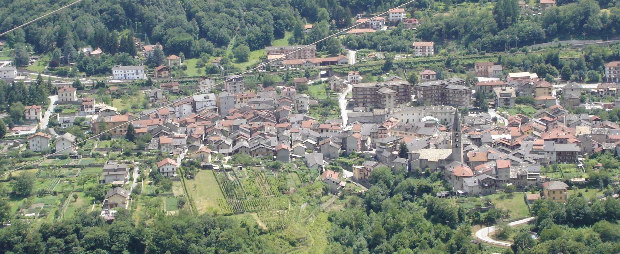 Chiomonte, vu depuis les hauteurs près de Ramat